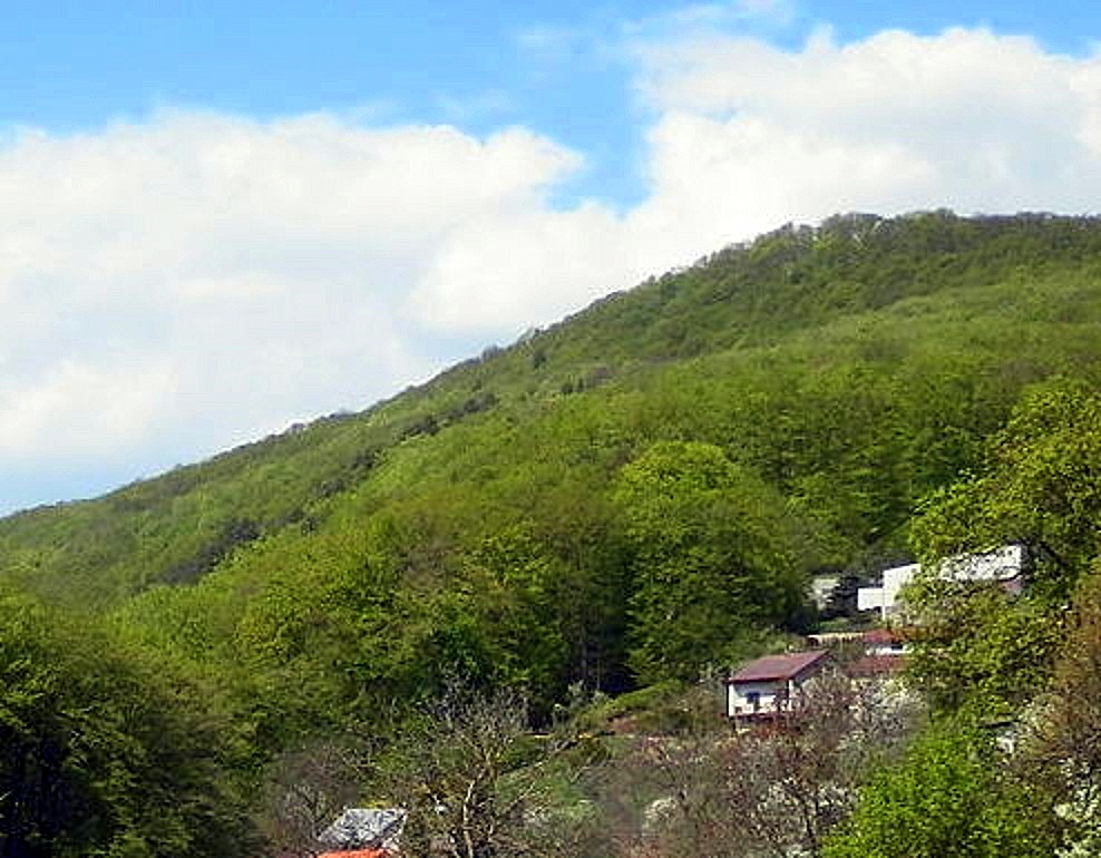 Vpravo zalesnený hradný kopec, na jeho vrchole sa nachádzajú ruiny Kysackého hradu. Obec Kysak.